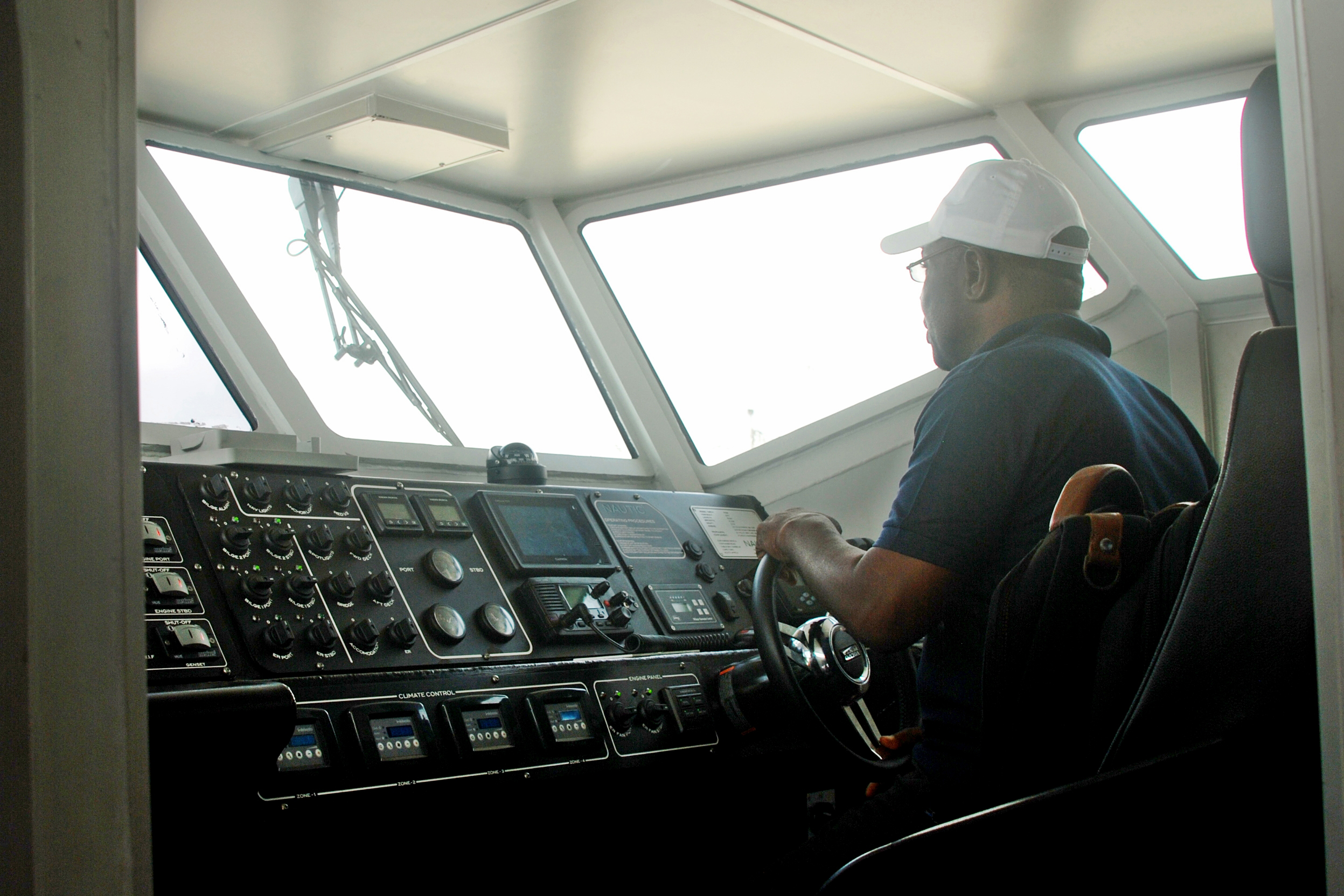 un capitaine à bord d'un bateau-bus à Abidjan This is an image of "African people at work" from Ivory Coast